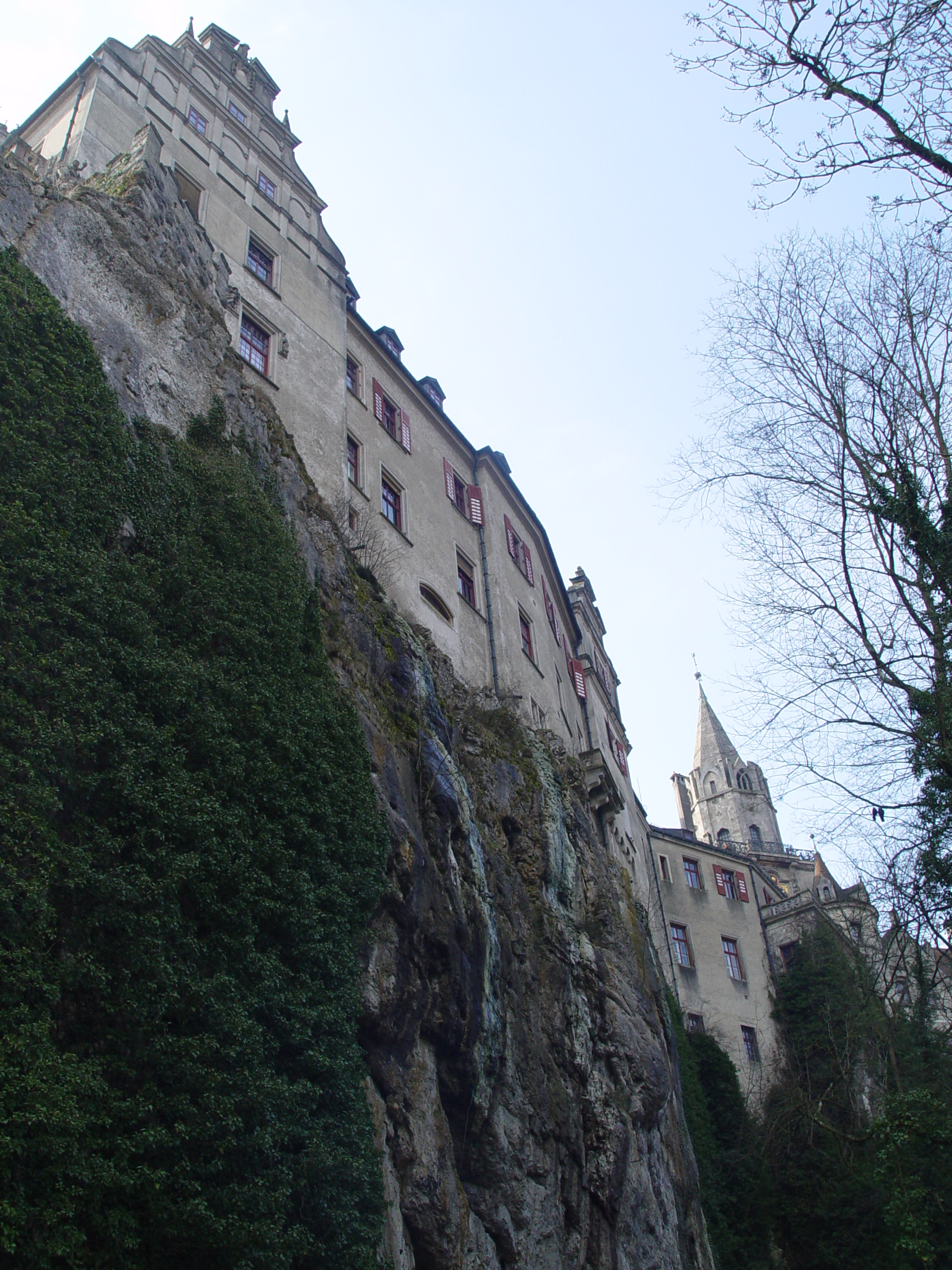 Schloss Sigmaringen vom Fuß des Schlossbergs aus gesehen